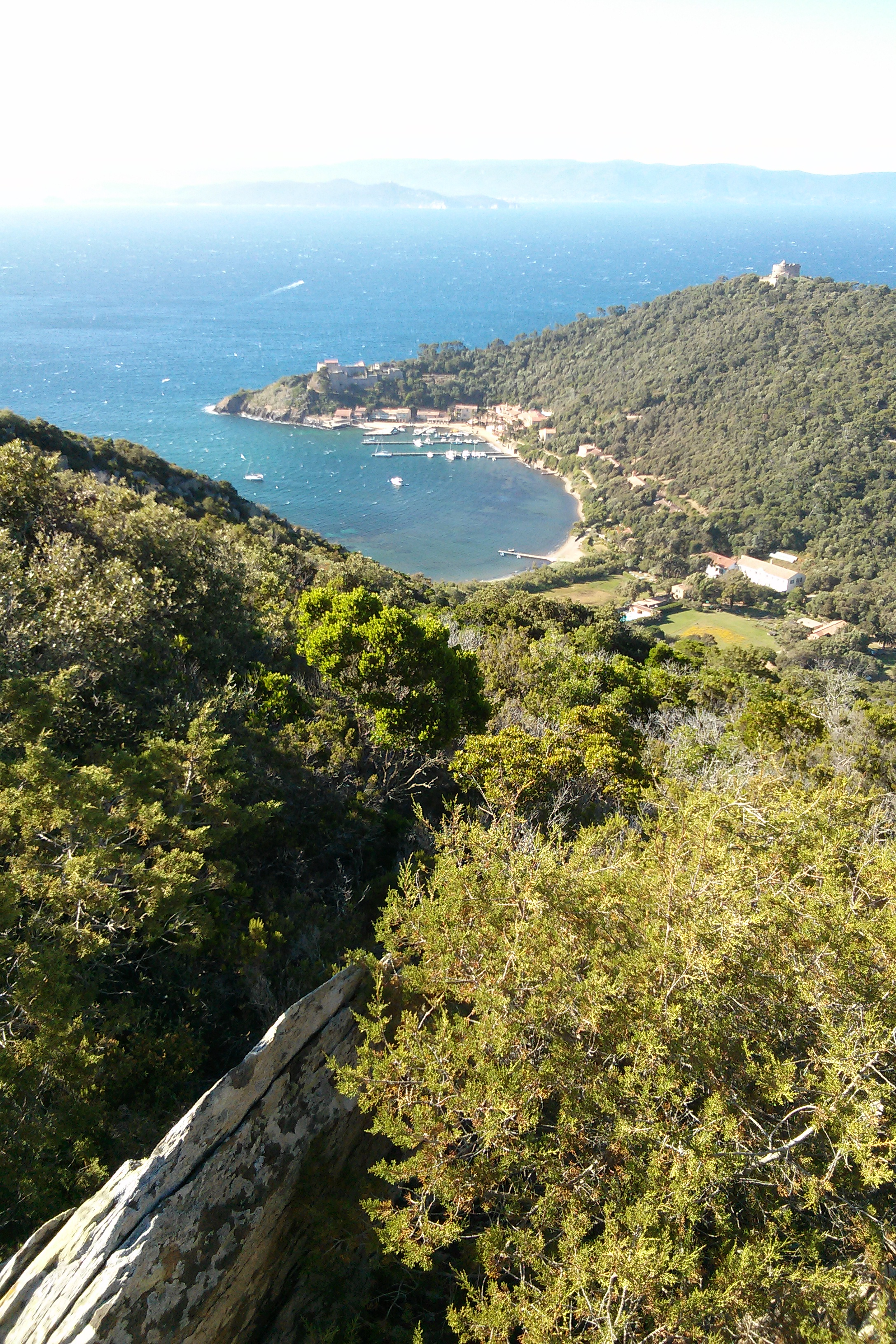 Rade de Port Cris vue depuis le sommet du Mont Vinaigre